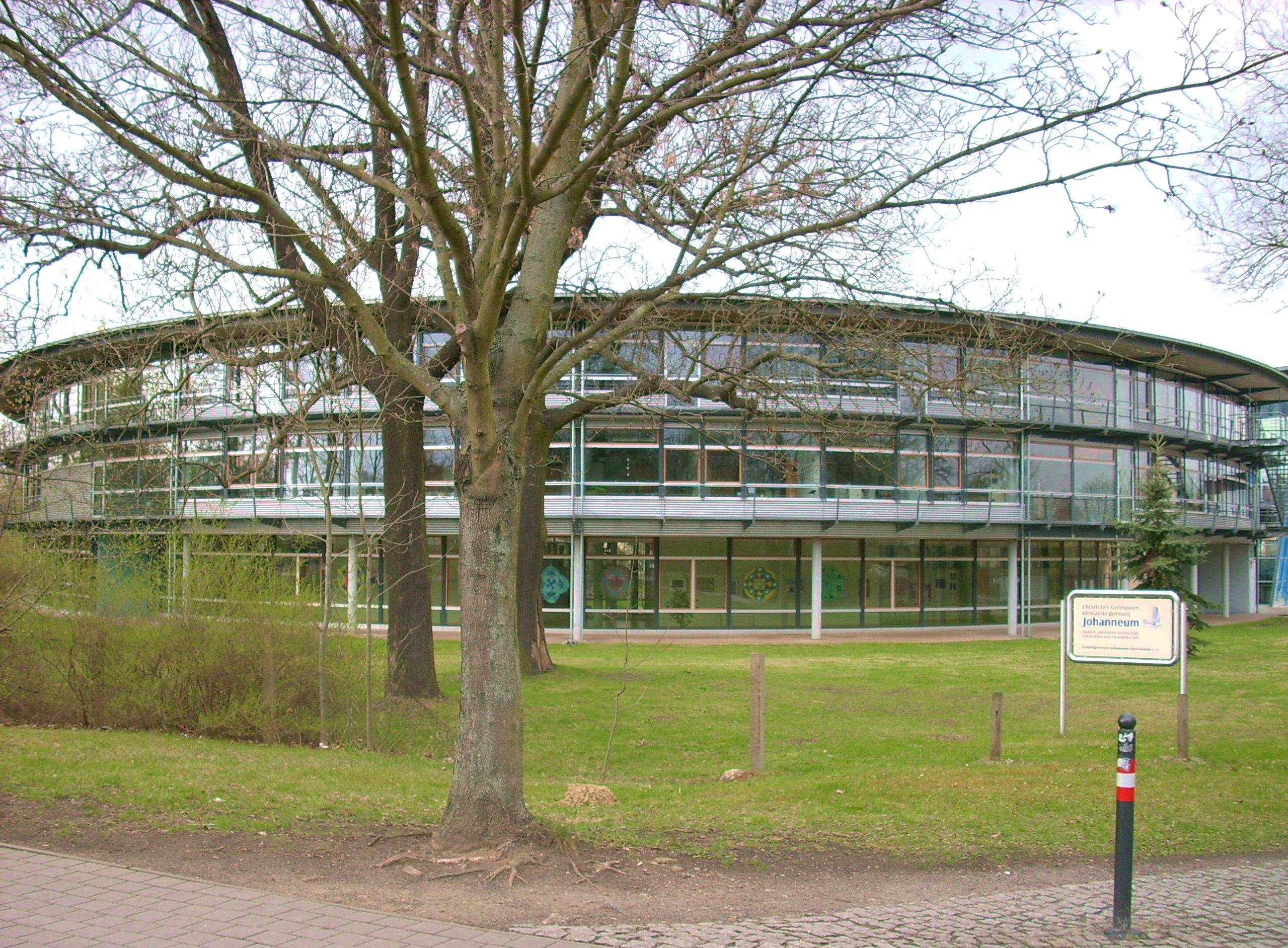 Johanneum, Gymnasium in Hoyerswerda